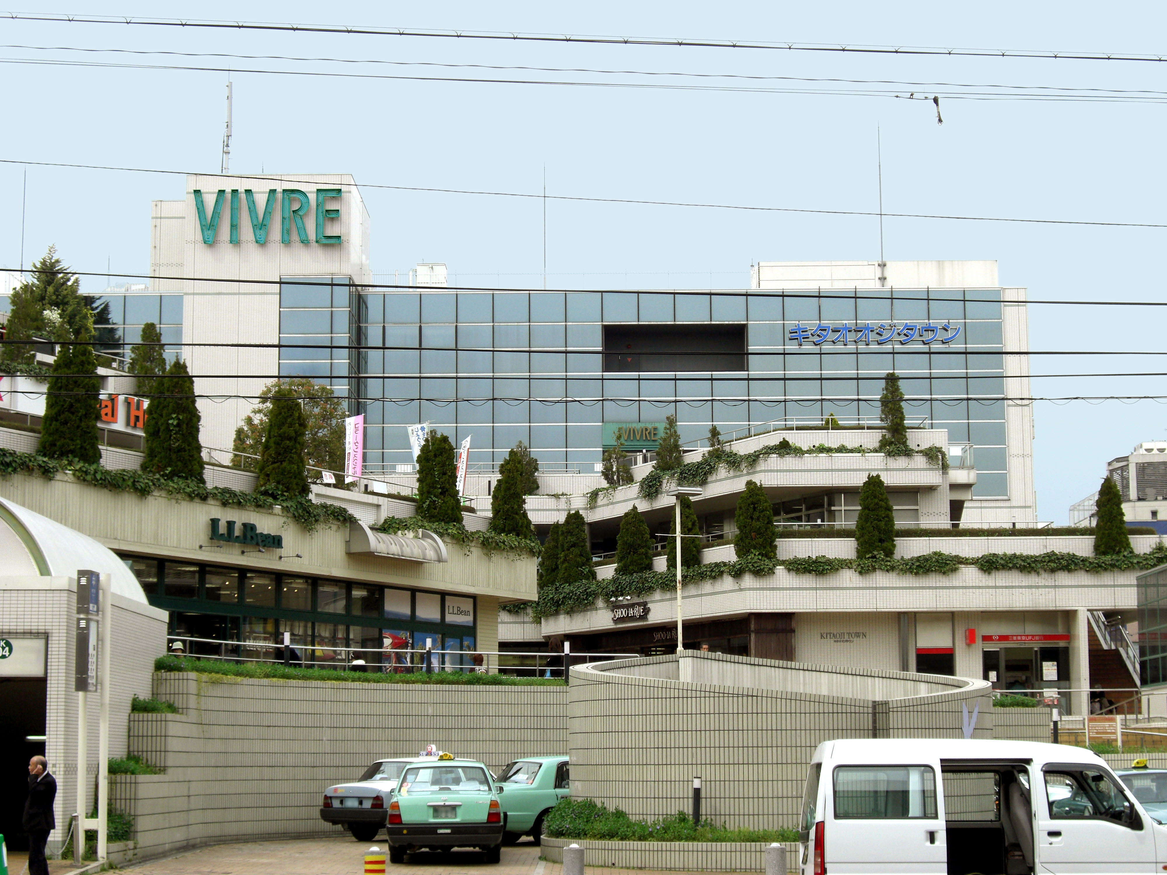 Kitaoji VIVRE,Kita-ku Kyoto-City Kyoto Japan.